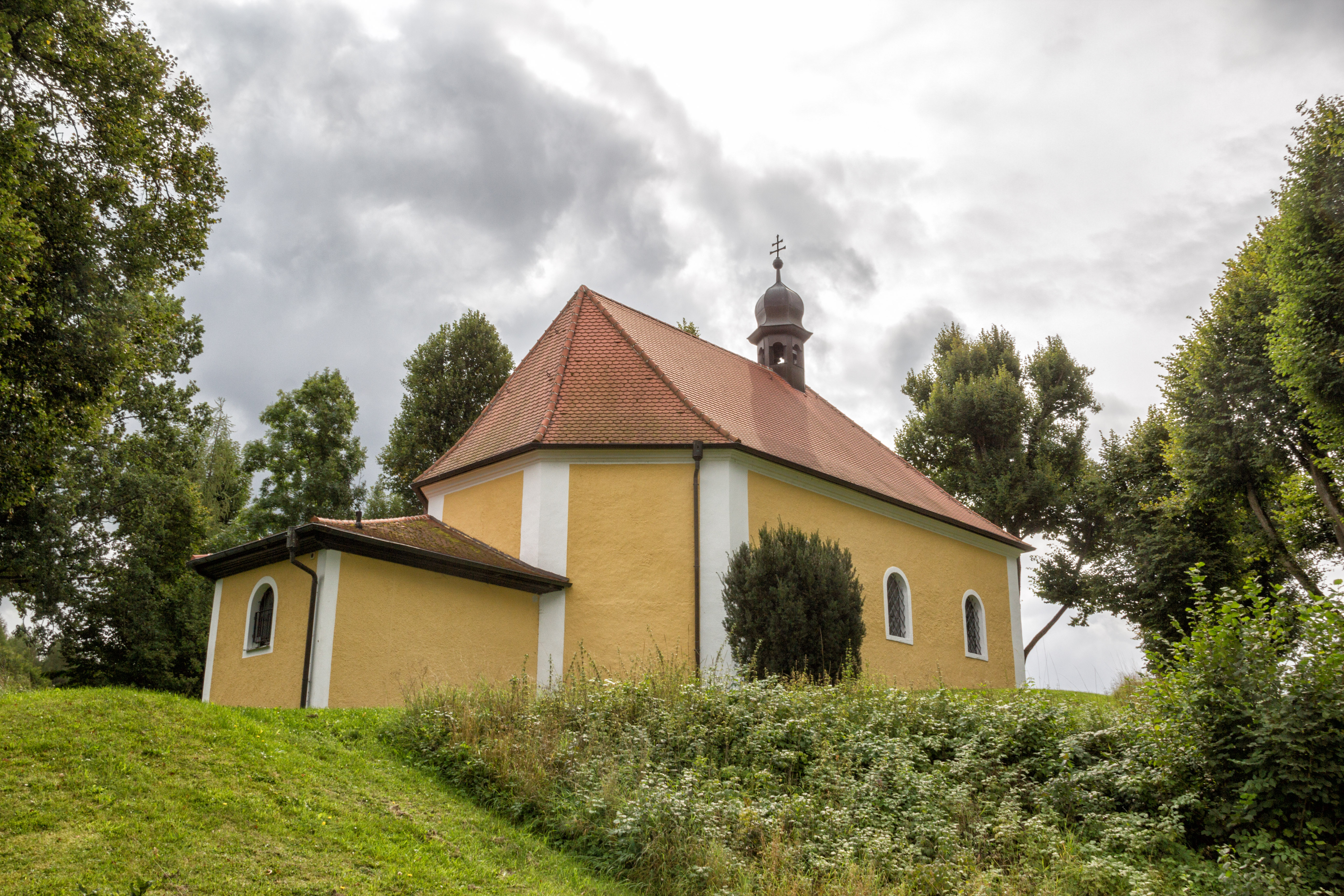 Katholische Kapelle St. Maria Magdalena, verputzter, dreiseitig geschlossener Massivbau mit Walmdach und Zwiebeldachreiter, bezeichnet mit „1743“; mit AusstattungThis is a photograph of an architectural monument.